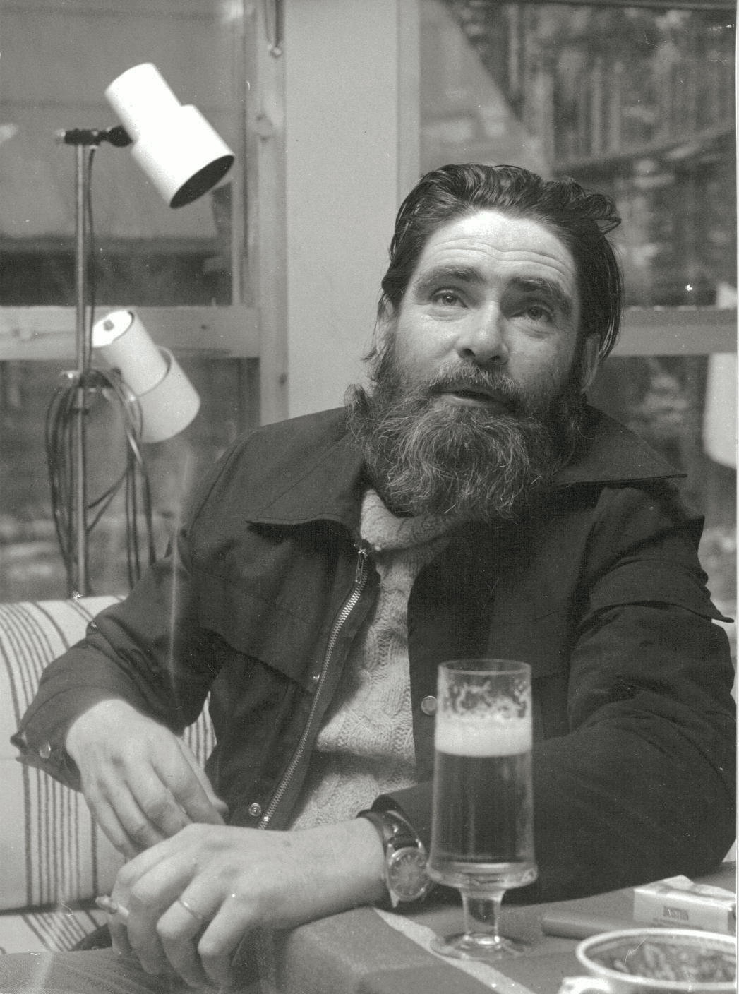 Mustavalkoinen valokuva Daniel Sibakow:sta, skannattu omasta valokuvasta